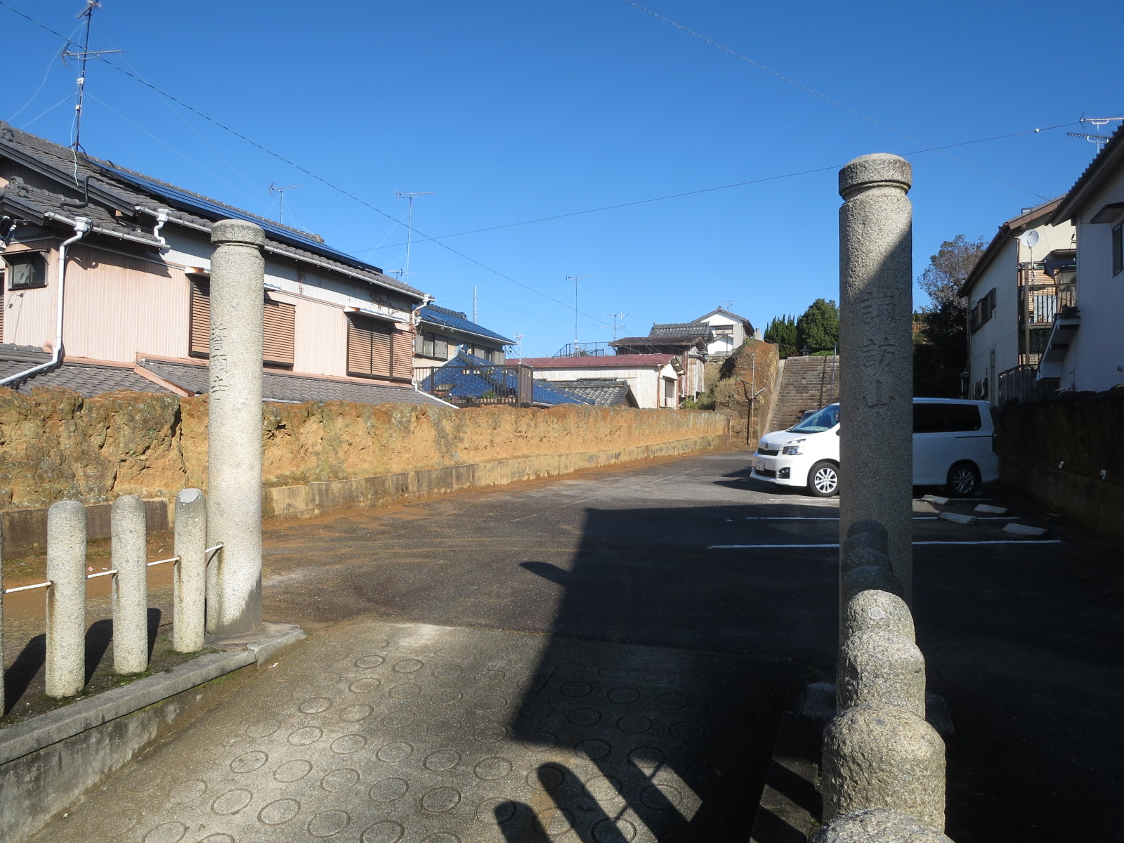 誓願寺（岡崎市梅園町）